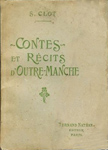 cover of the book Contes et Récits d'Outre-Manche, Librairie Fernand Nathan